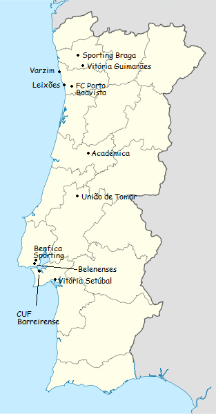 Carta dos clubes participantes do campeonato de portugal de futebol de primeira divisao 1969-1970